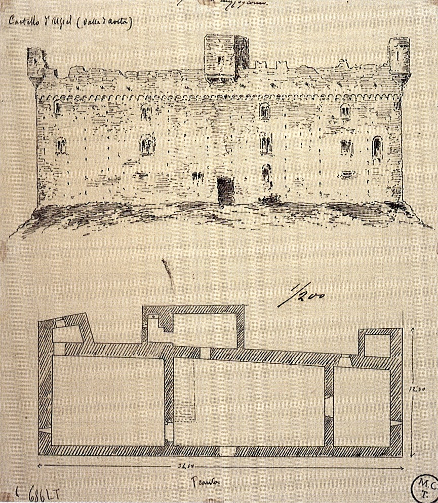 Pianta e prospetto a mezzogiorno del Castello di Ussel, Valle d'Aosta, Italia, disegno realizzato da A. D'Andrade. Conservato a Torino, GAM (cart 4/C, f. 246/1).